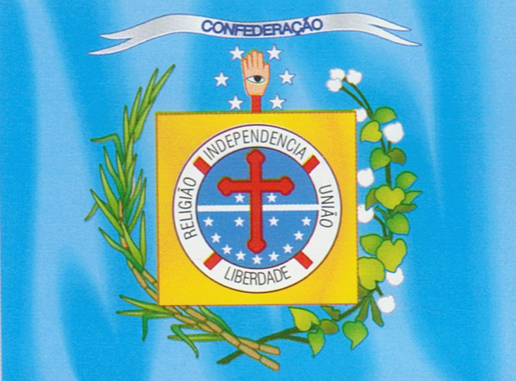 Bandeira da Confederação do Equador, atualmente adotada como Bandeira do Governador do Ceará.